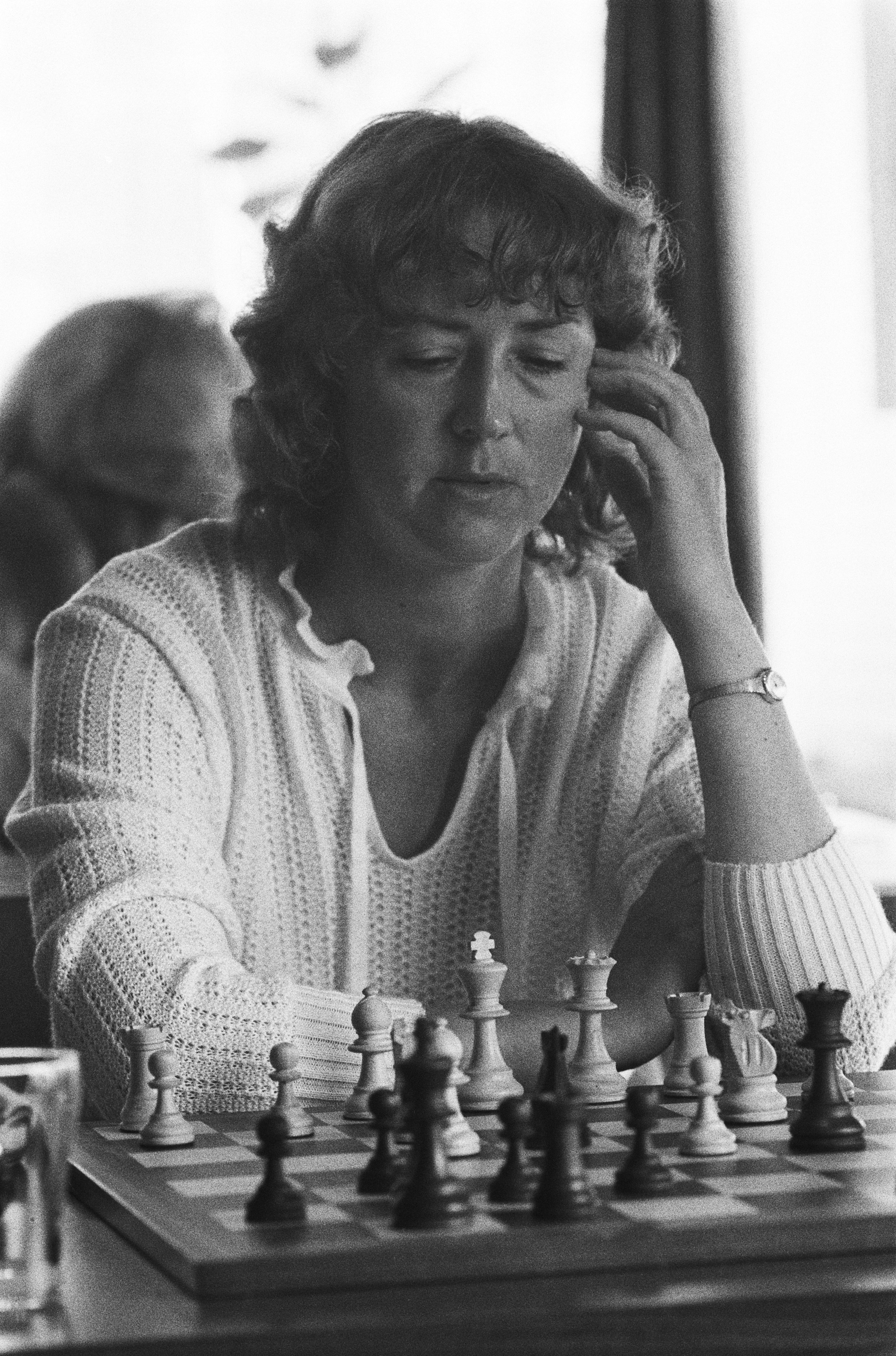 Nederlandse kampioenschappen schaken dames; Carla Bruinenberg, 1982.